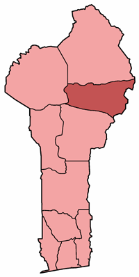 Mappa della diocesi di N'Dali, nel Bénin. Lavoro personale, eseguito a partire da questa immagine di Commons. Fonte per i confini delle diocesi: Guida delle missioni cattoliche 2005, a cura della Congregatio pro gentium evangelizatione, Roma, Urbaniana University Press, 2005. Categoria:Chiesa cattolica in Benin